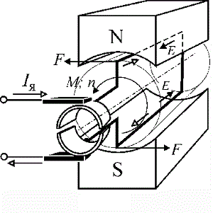 Схема